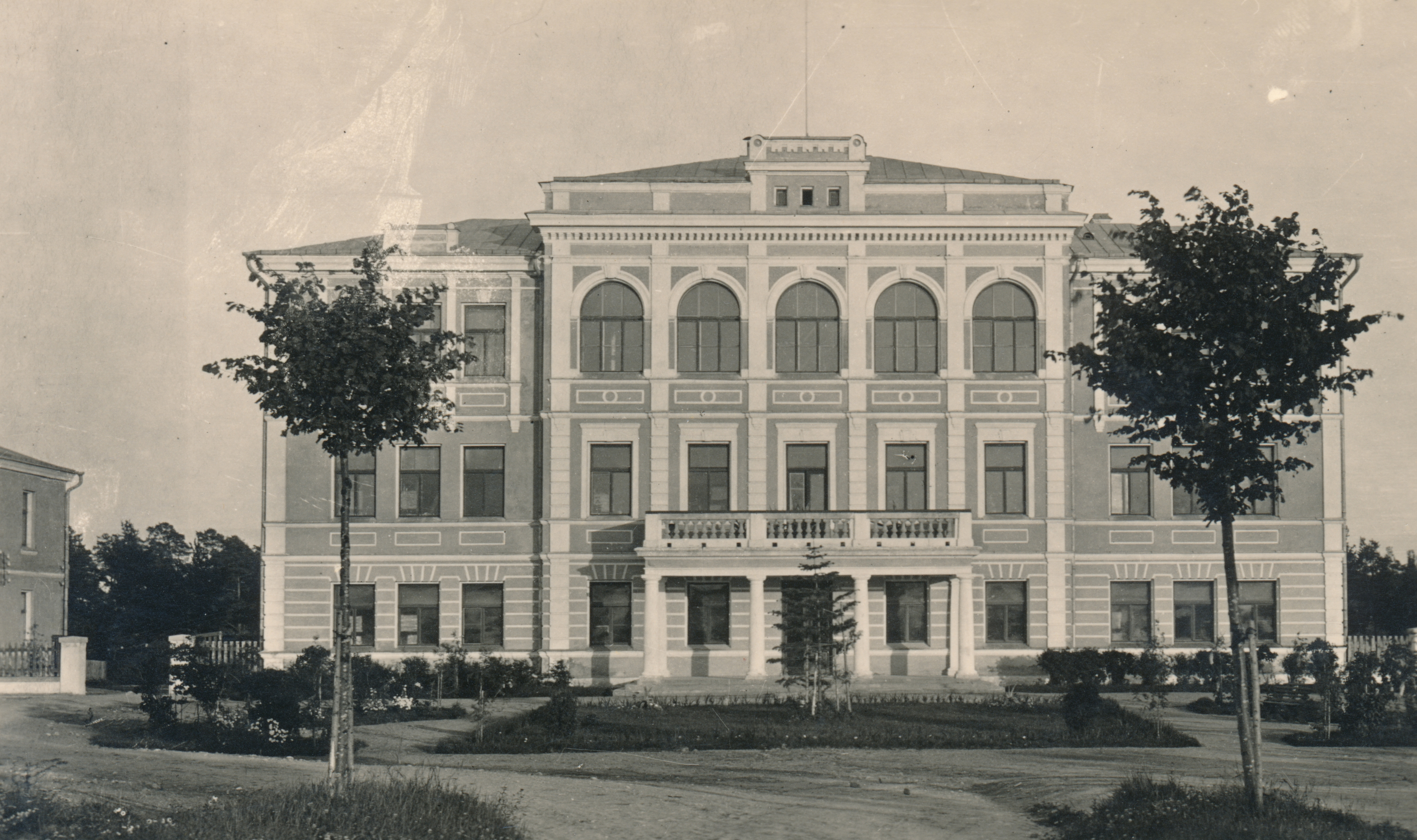 Rakvere õpetajate seminar